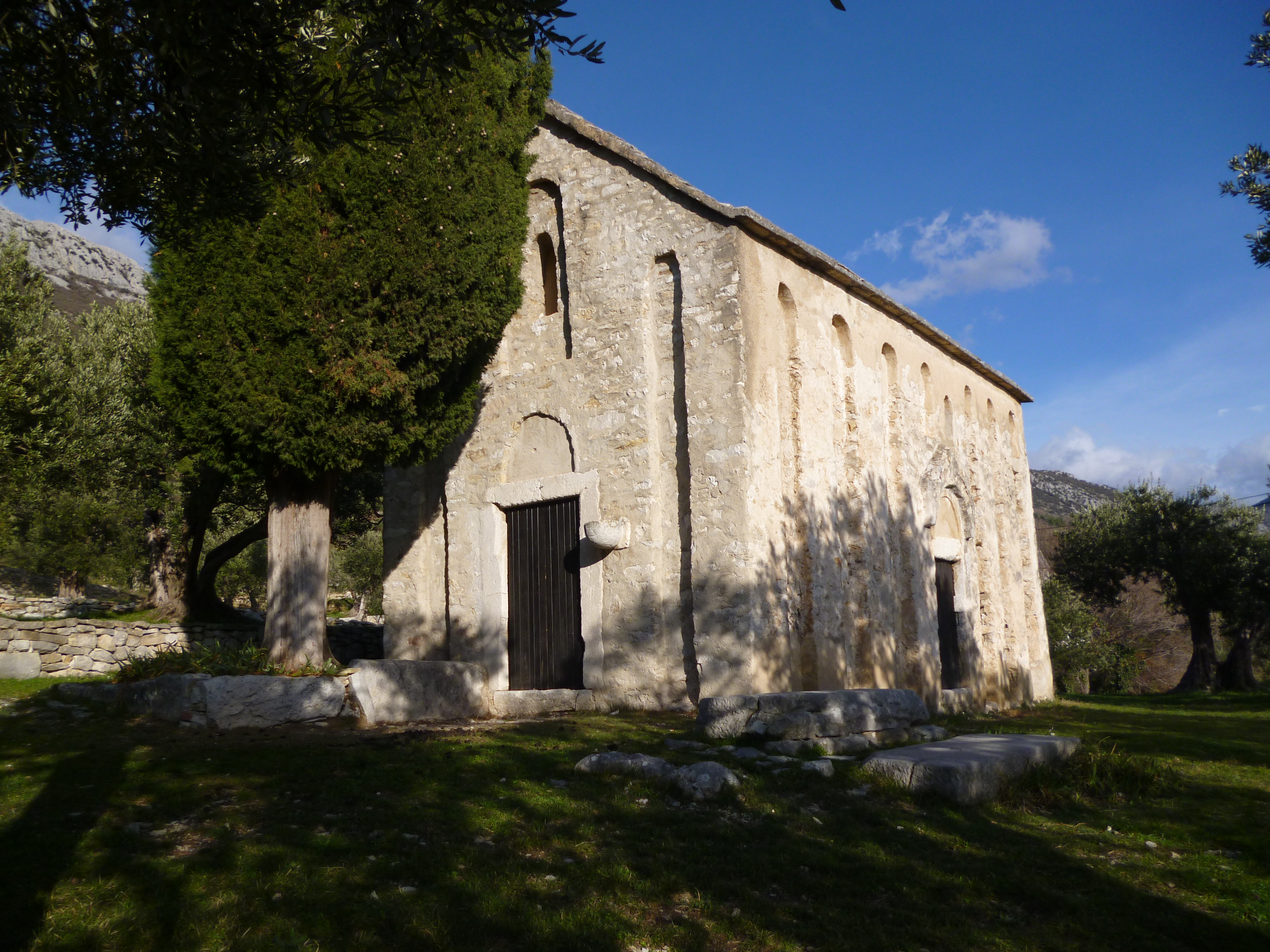 crkva sv.Juraj od Raduna iz 10.stoljeća-Kaštel Stari